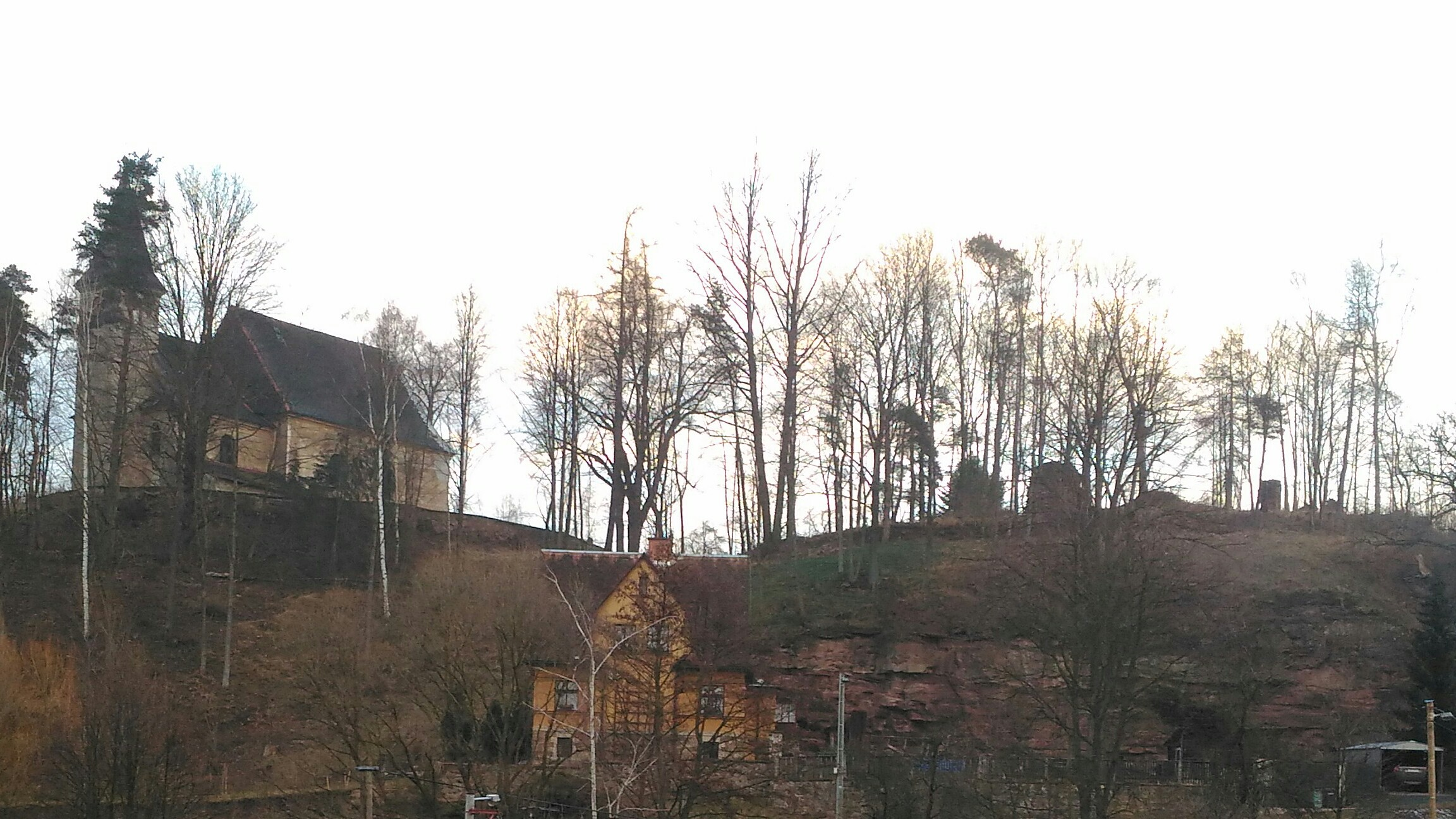 Starý Rokytník, kostel sv. Šimona a Judy a dům (čp. 185?), přes údolí.